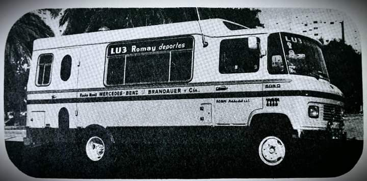 Camión de transmisiones móviles de LU3 y el relator Miguel Romay